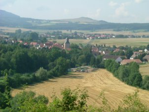 Meimbressen, Ortsansicht von Norden nach Süden, in der Mitte des Ortes die Kirche, dahinter der Ort Ehrsten, im Hintergrund der Dörnberg.